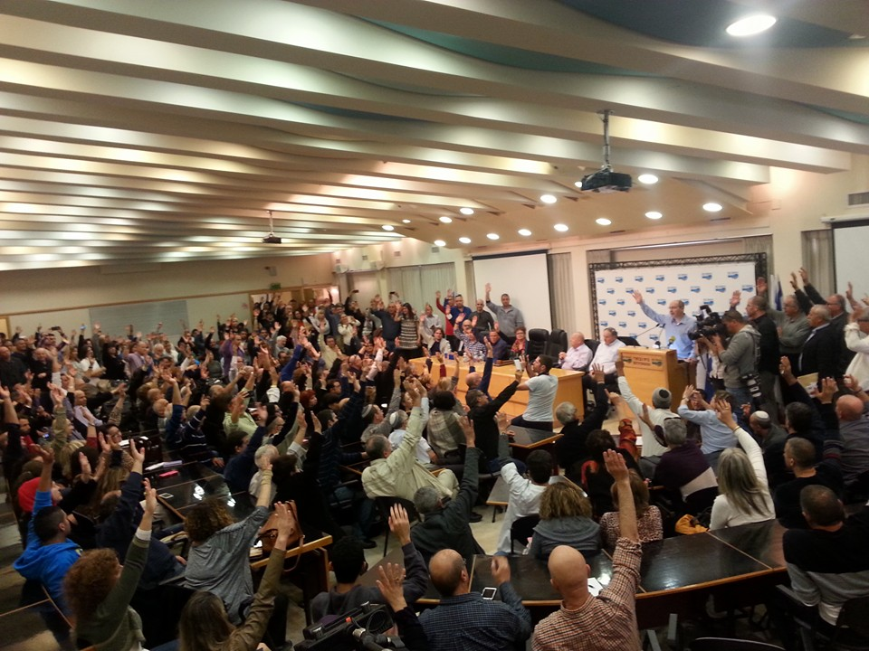 הצבעה בבית נבחרי ההסתדרות על אישור שביתה כללית במשק, במסגרת סכסוך העבודה בנושא הסכמי המסגרת לעובדי המגזר הציבורי, לאחר שלוש שנים בהן לא נחתמו הסכמי מסגרת חדשים.